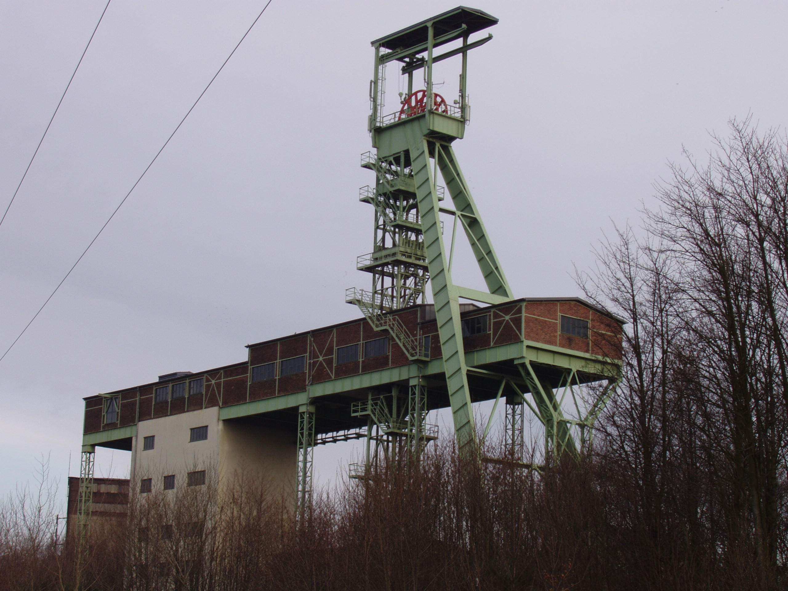 Fördergerüst der Eisenerzgrube Georg in Willroth